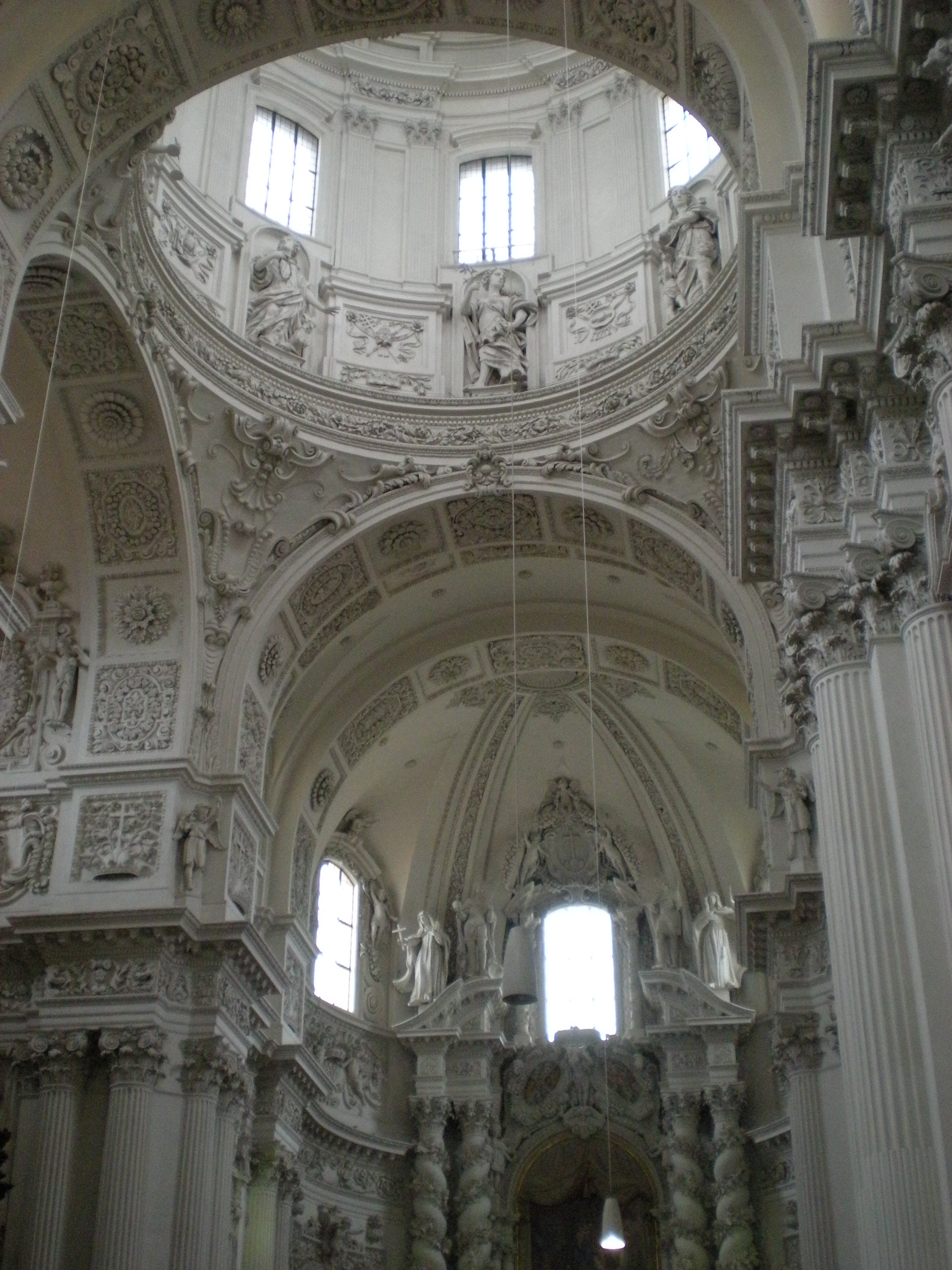 Blick in Tambour und Chor der Theatinerkirche (St. Kajetan) in München